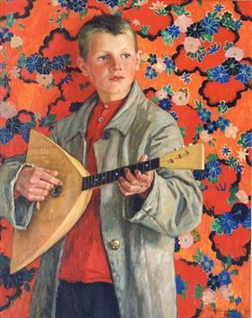 Painting by Nikolai Bogdanov-Belsky